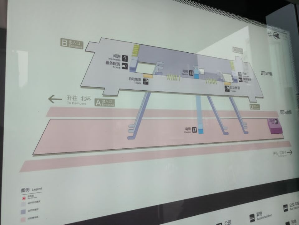 长春人民广场站站台结构